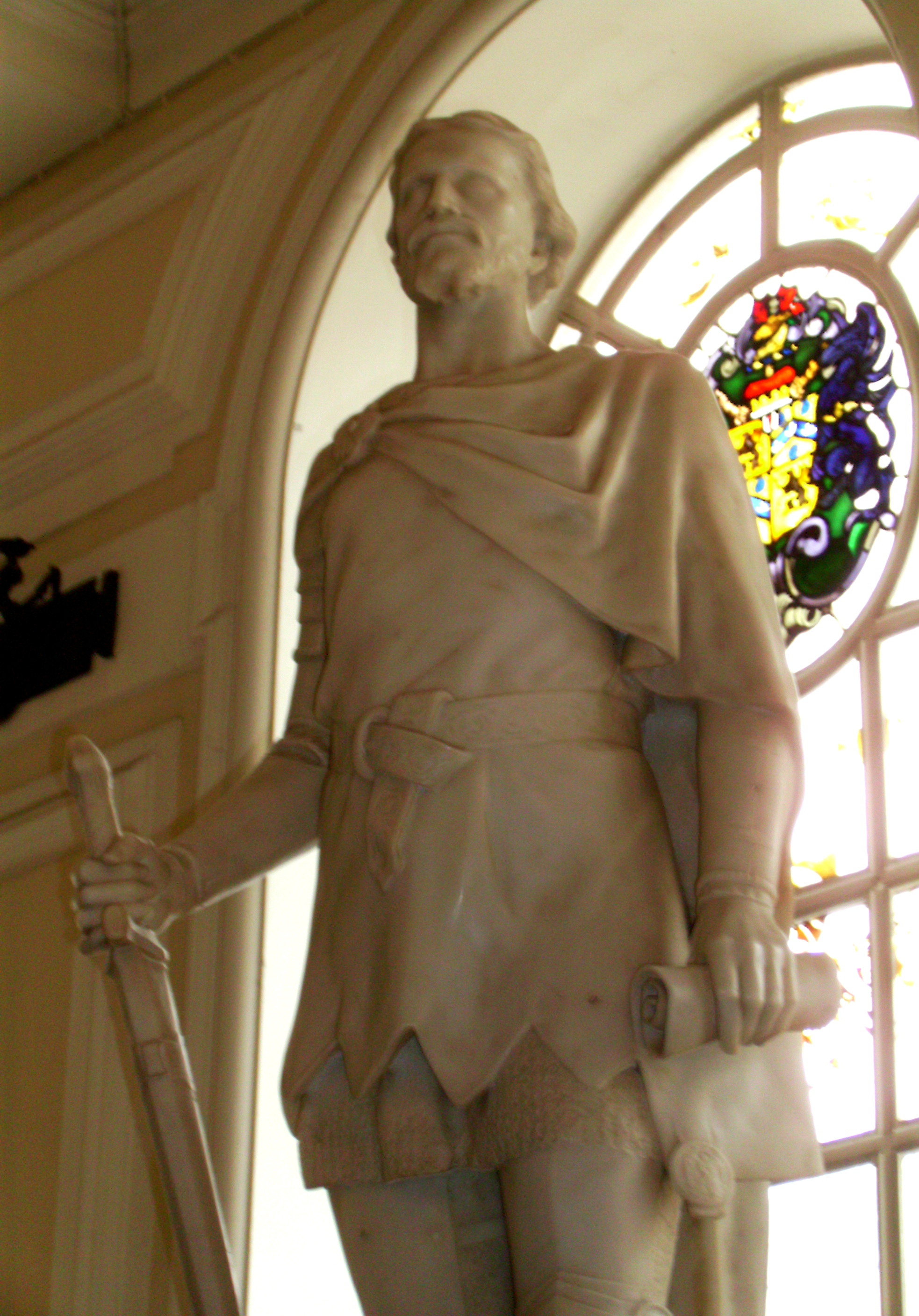 Owain Glyndŵr at City Hall, Cardiff, Wales